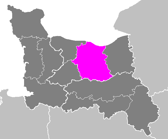 Maps of arrondissements and cantons of France: Arrondissement de Caen.PNG